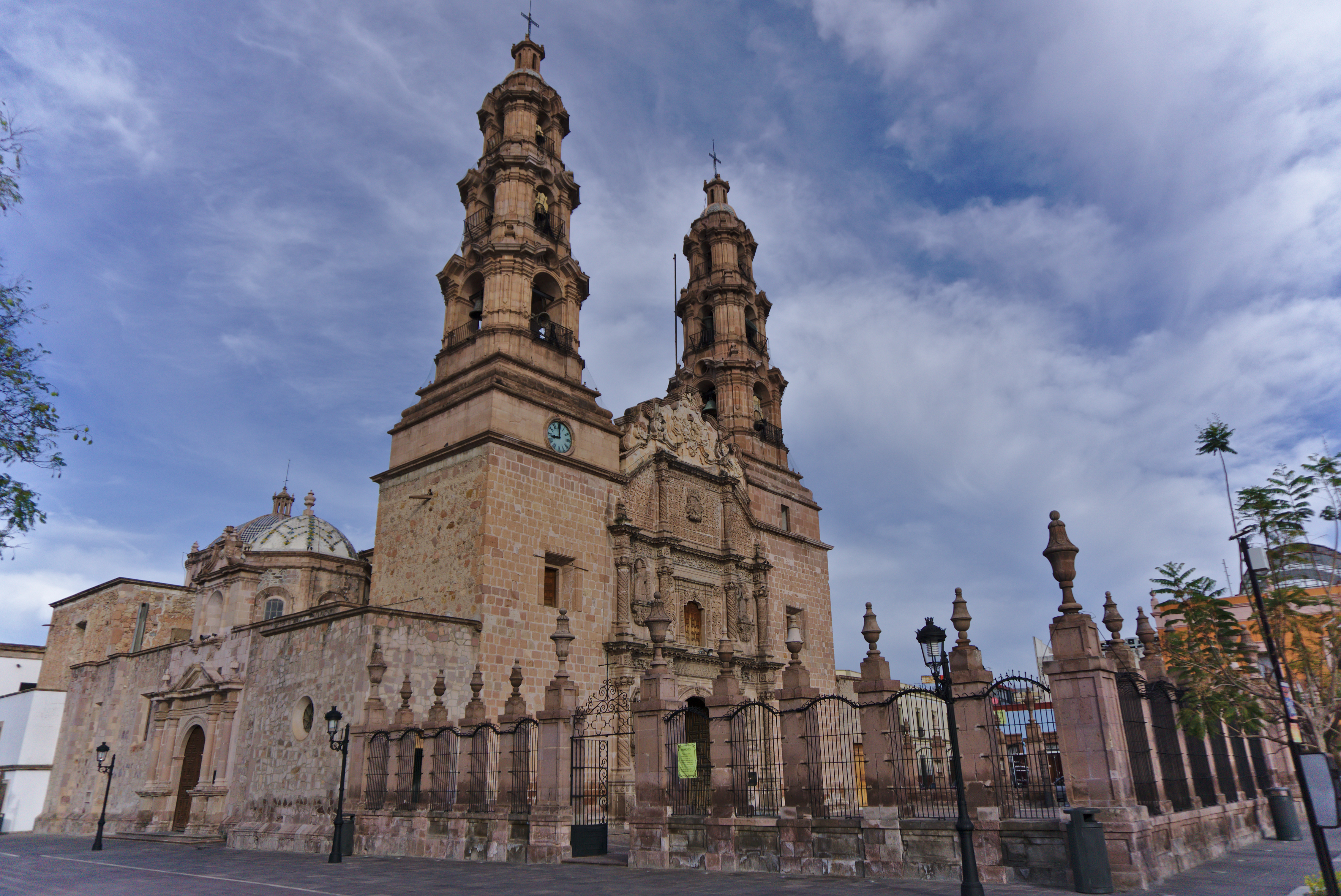 Catedral Basílica de la Virgen de la Asunción de la Ciudad de Aguascalientes, México